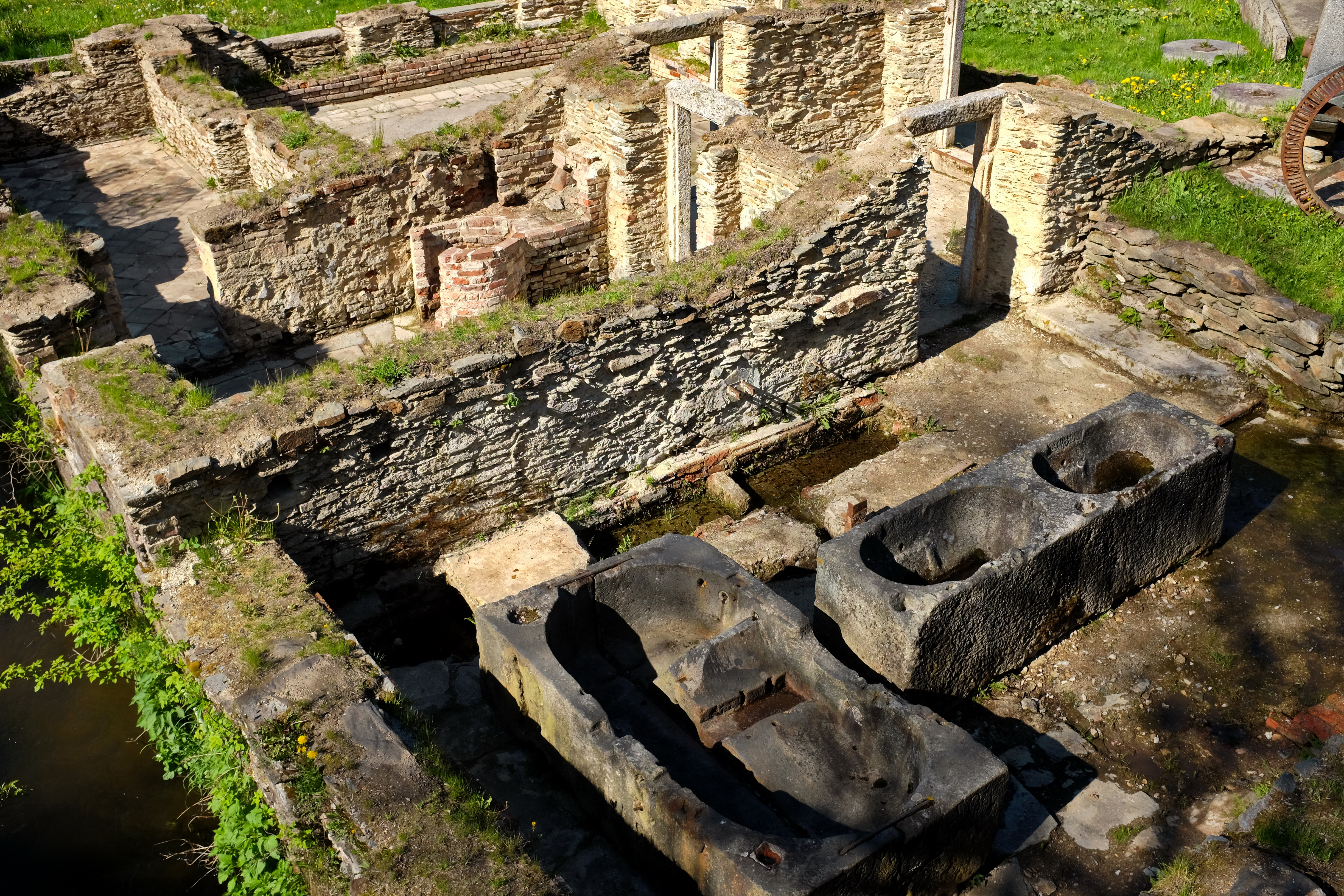 Papírna, pp. 68, Doubrava (Aš).